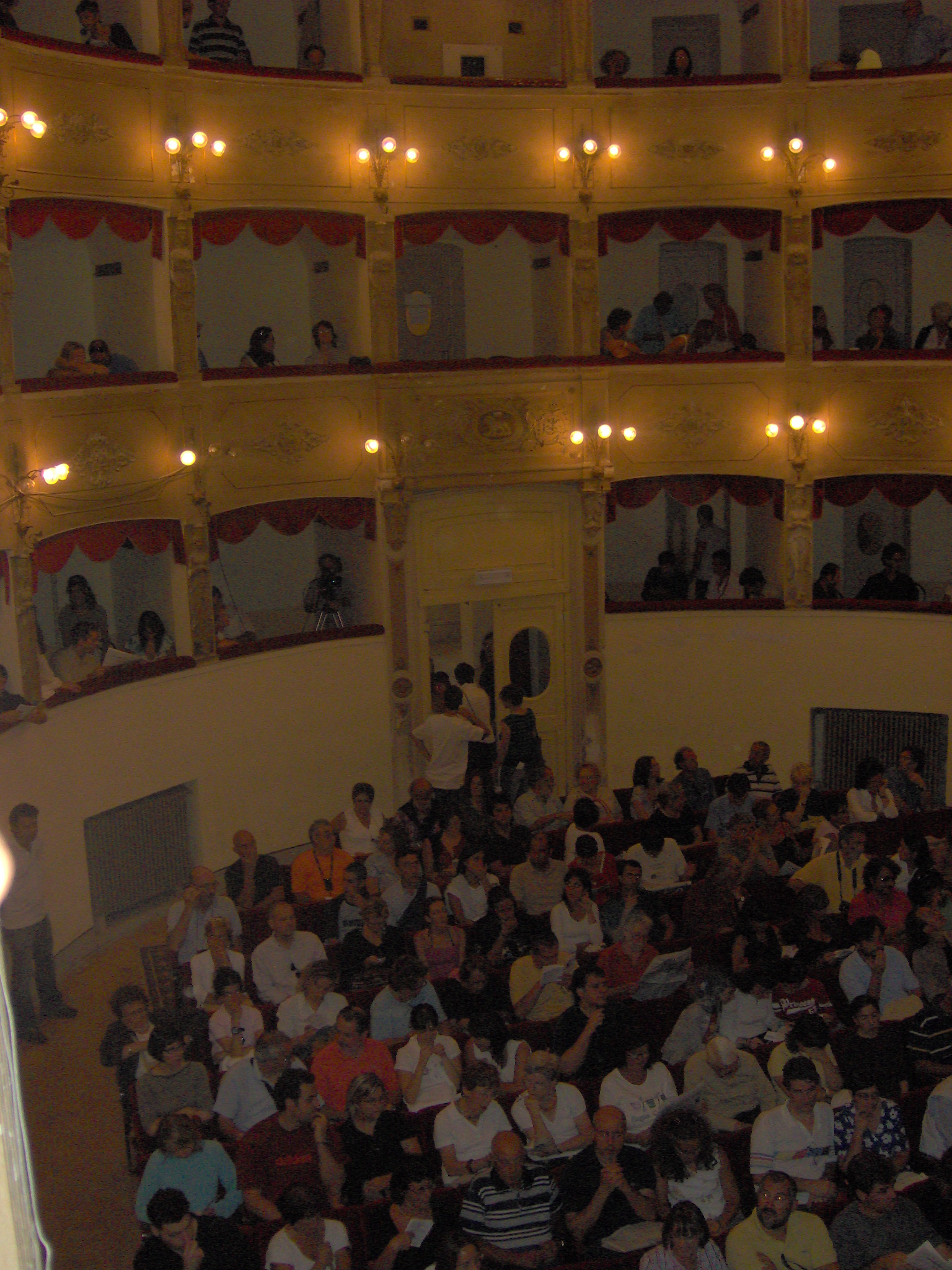 Palchetti del teatro Impavidi di Sarzana